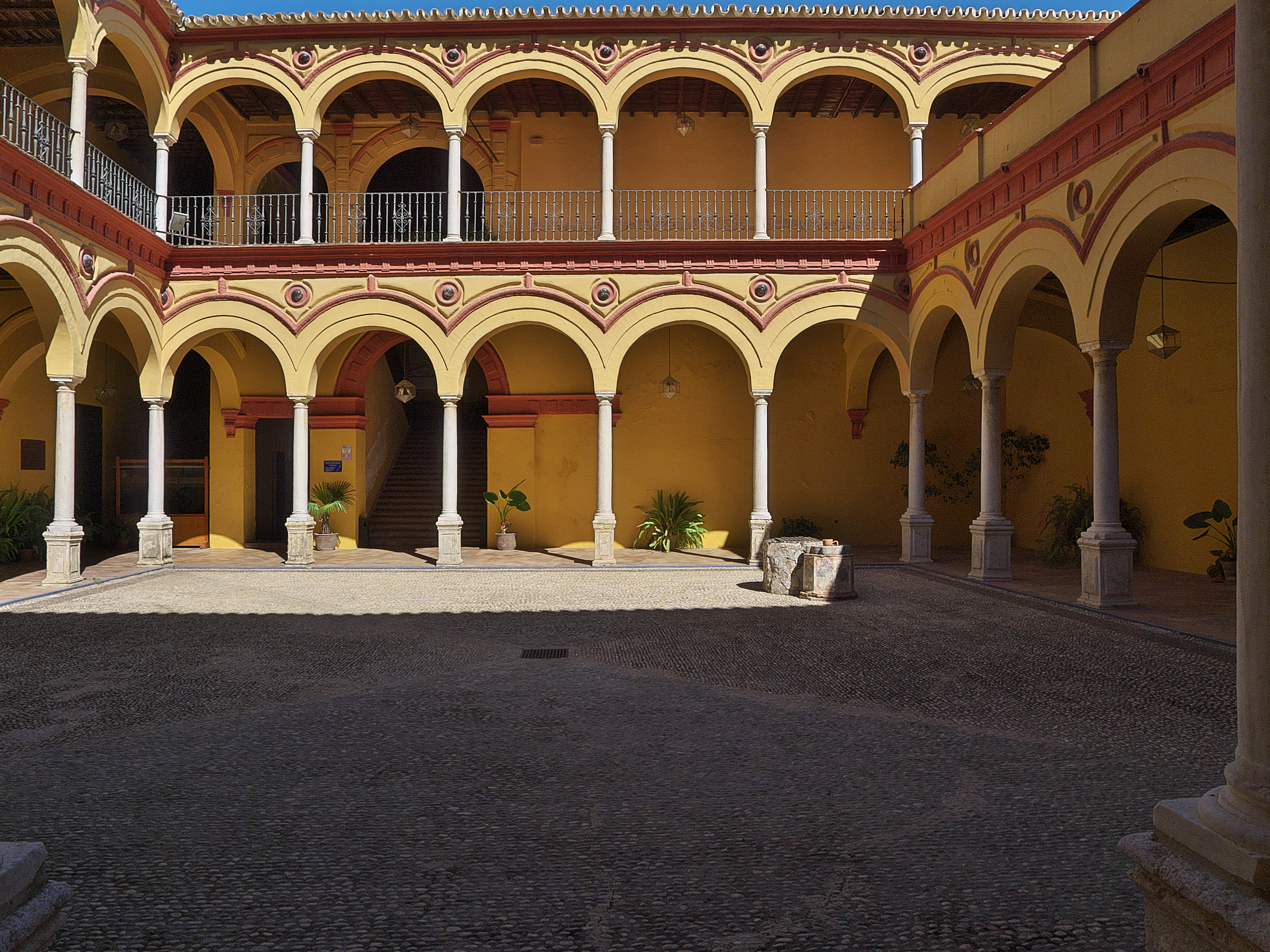 Claustro conventual, siglo XVI.